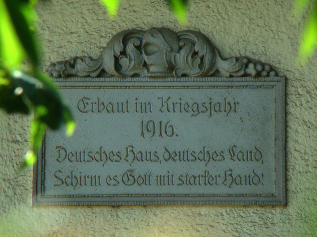 Tafel an der Liebigstraße 8 in Heilbronn